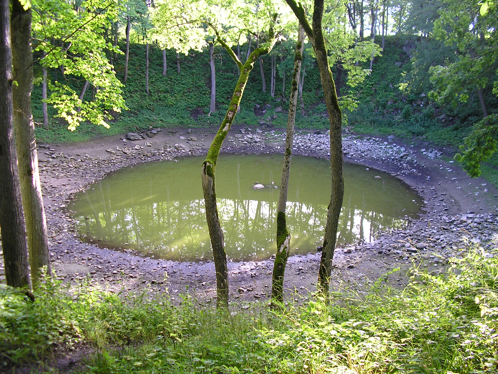 Kaali main meteorite crater on 10 August 2005.